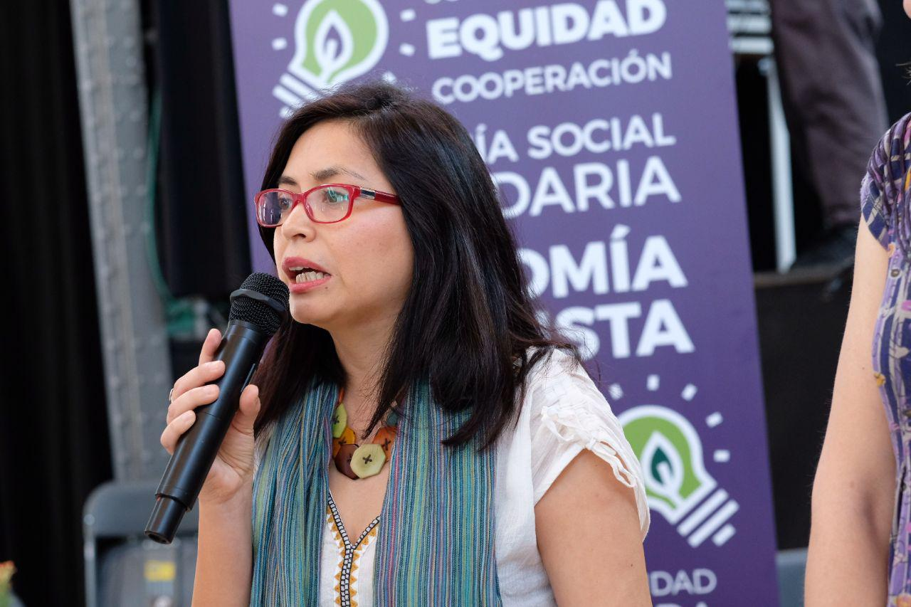 En un entorno lúdico y festivo ha arrancado esta mañana la 2ª Feria de Economía Feminista, que reúne a más de treinta entidades de mujeres, productoras de bienes y servicios que contienen un sello feminista. Se desarrolla en Arganzuela durante toda la jornada de hoy con un objetivo principal: visibilizar el trabajo de las entidades y empresas que desarrollan su trabajo en favor de un modelo económico y productivo igualitario, corresponsable, interdependiente y ecodependiente. La concejala que preside el distrito, Rommy Arce, ha presentado la feria, ubicada en la Nave de Terneras -paseo de la Chopera, 10-.